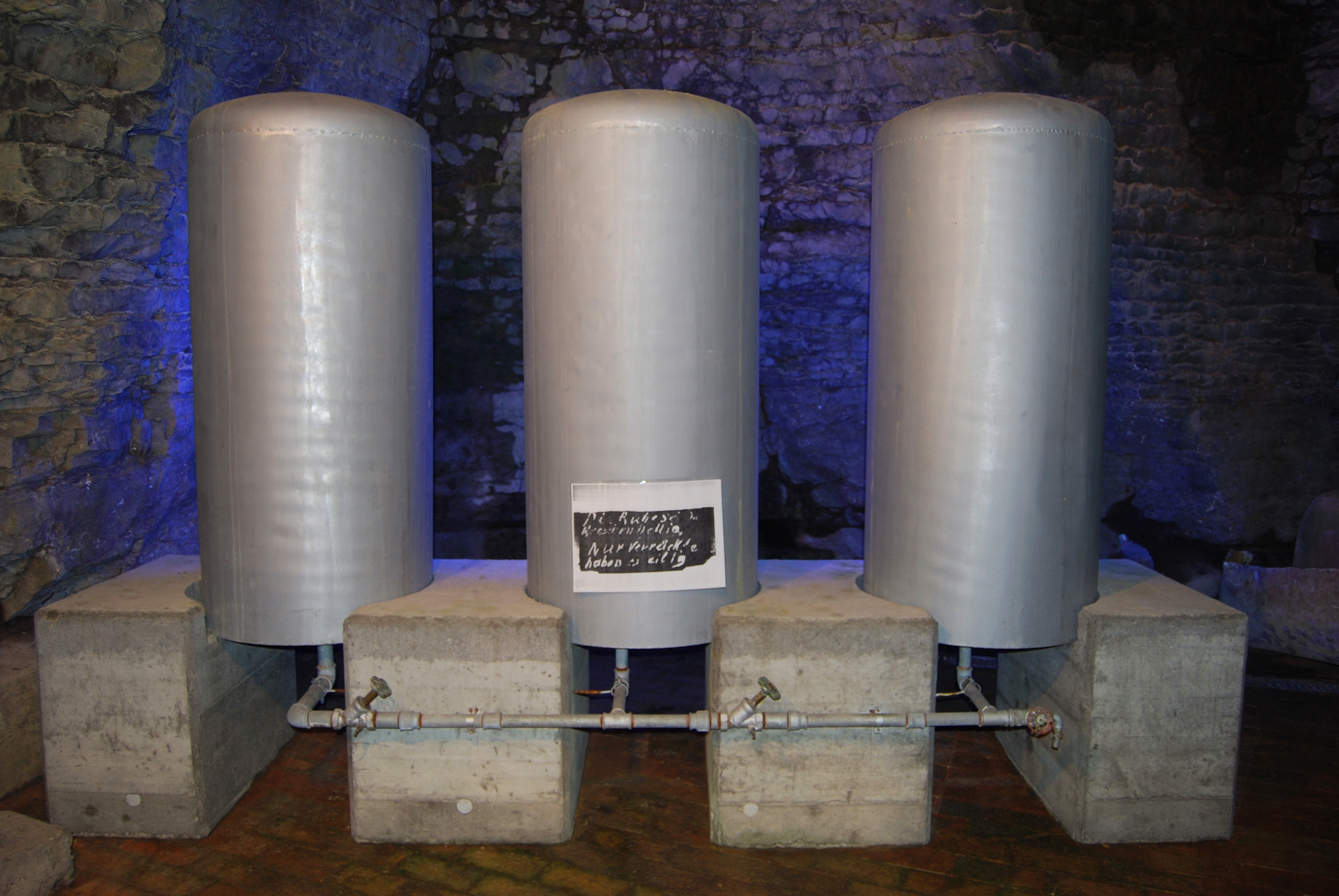 Nachbildungen der drei Schwerwassertanks des Reaktors Haigerloch, aufgestellt im Atomkeller-Museum. Fotografiert mit Blitz. Die Original-Aufschrift lautet "Die Ruhe sei dem Menschen heilig, denn nur verrückte habens eilig".